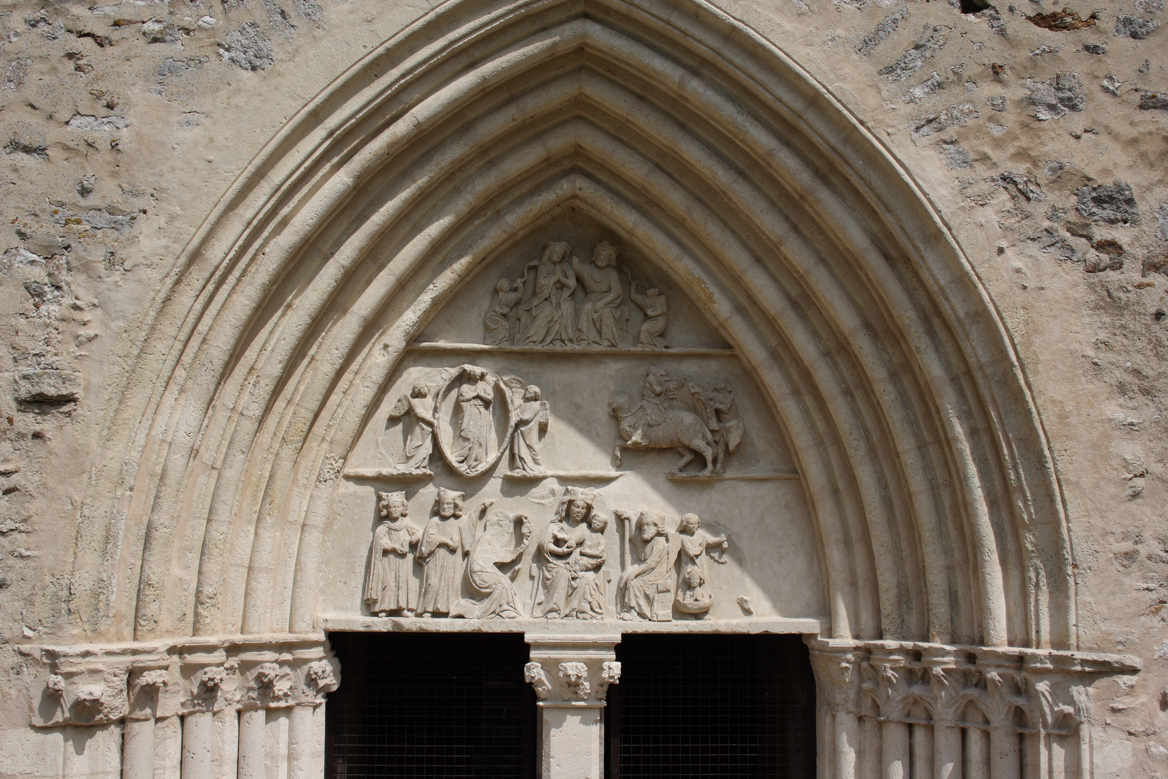 katholische Kirche Notre-Dame in Crécy-la-Chapelle